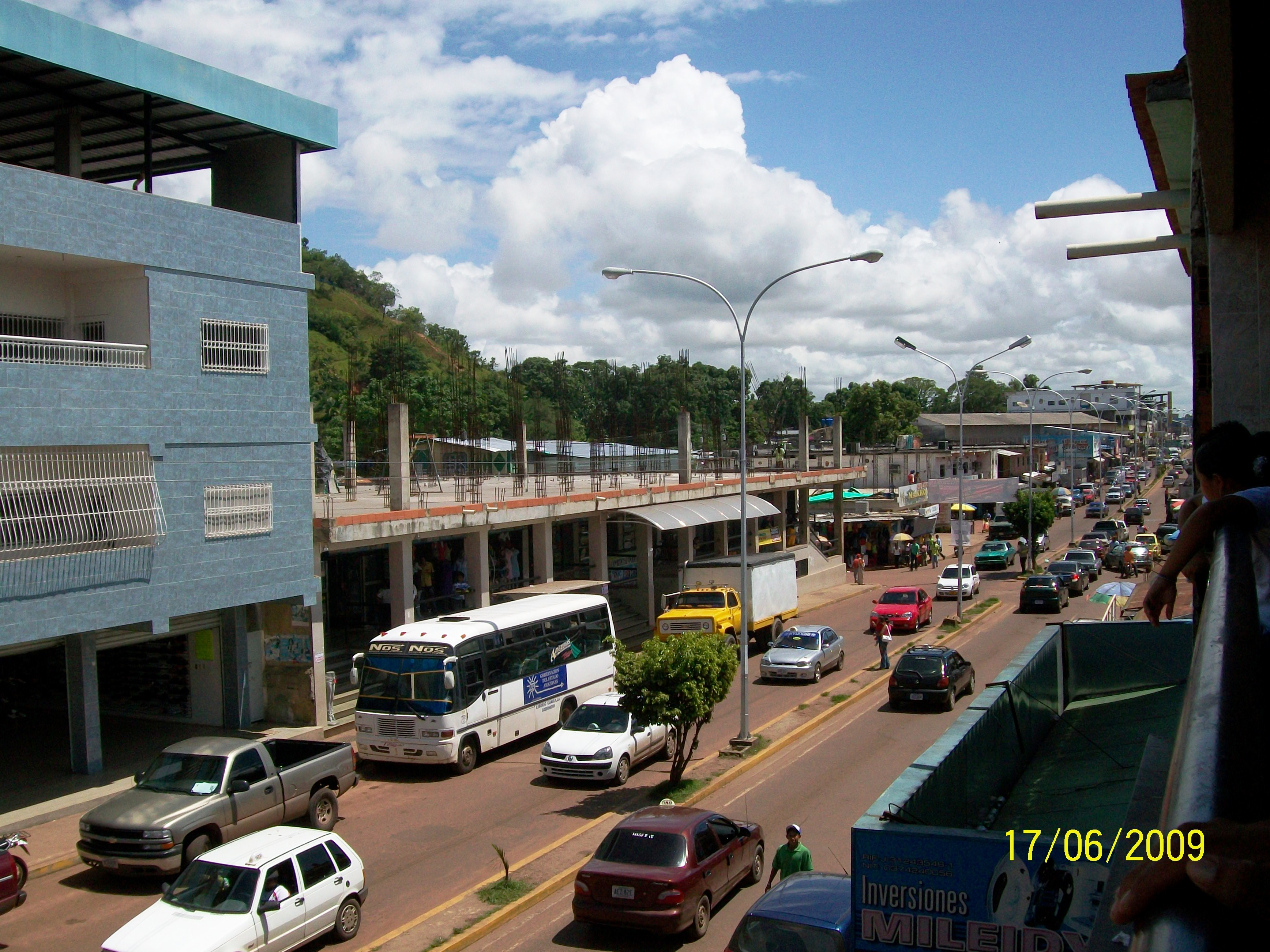 parte del centro de pto.ayacucho,capital del edo.amazonas en venezuela;zona comercial ubicada en la avenida orinoco